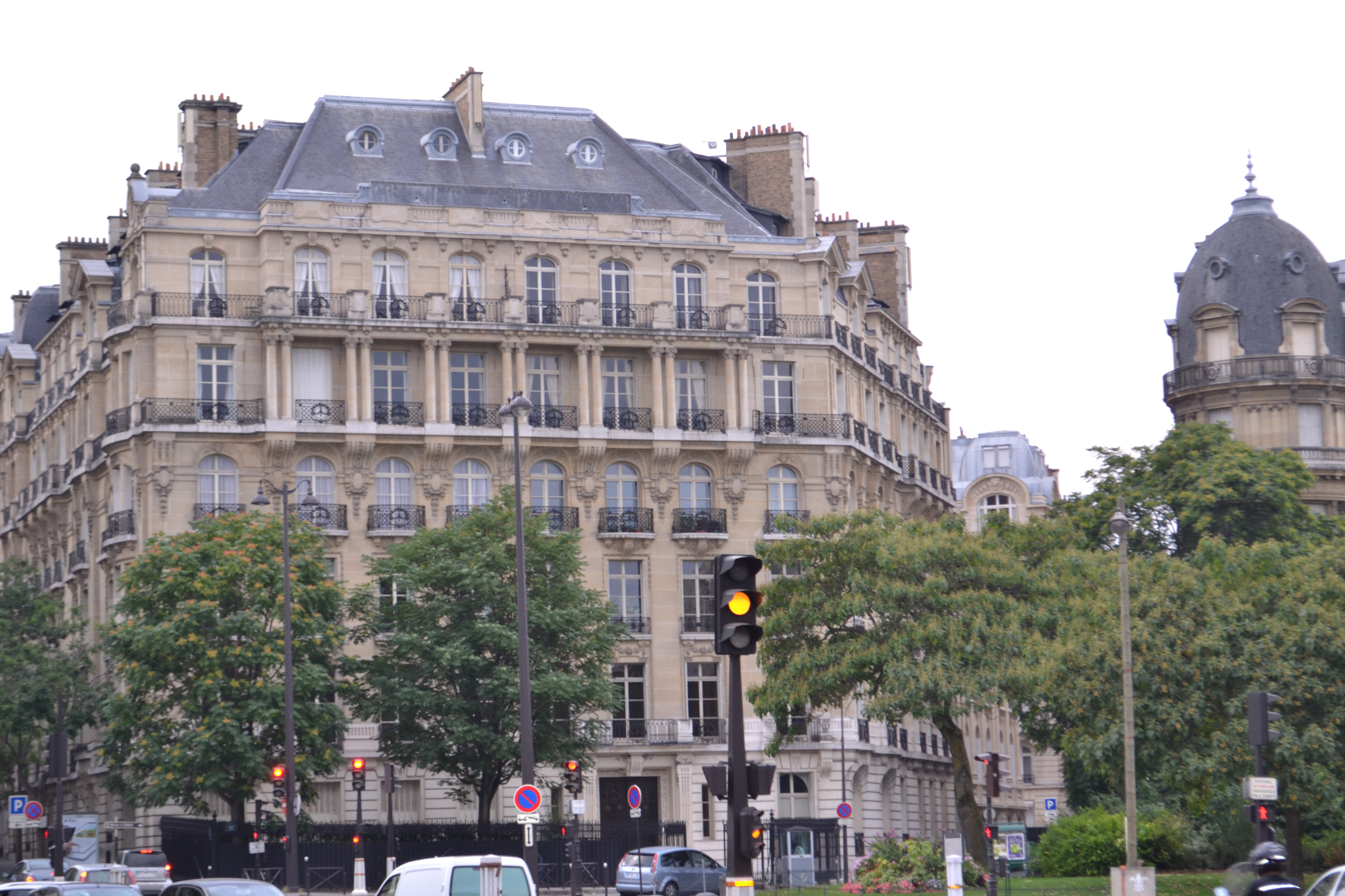 Yacht Club de France, N° 41 de l'avenue Foch à Paris